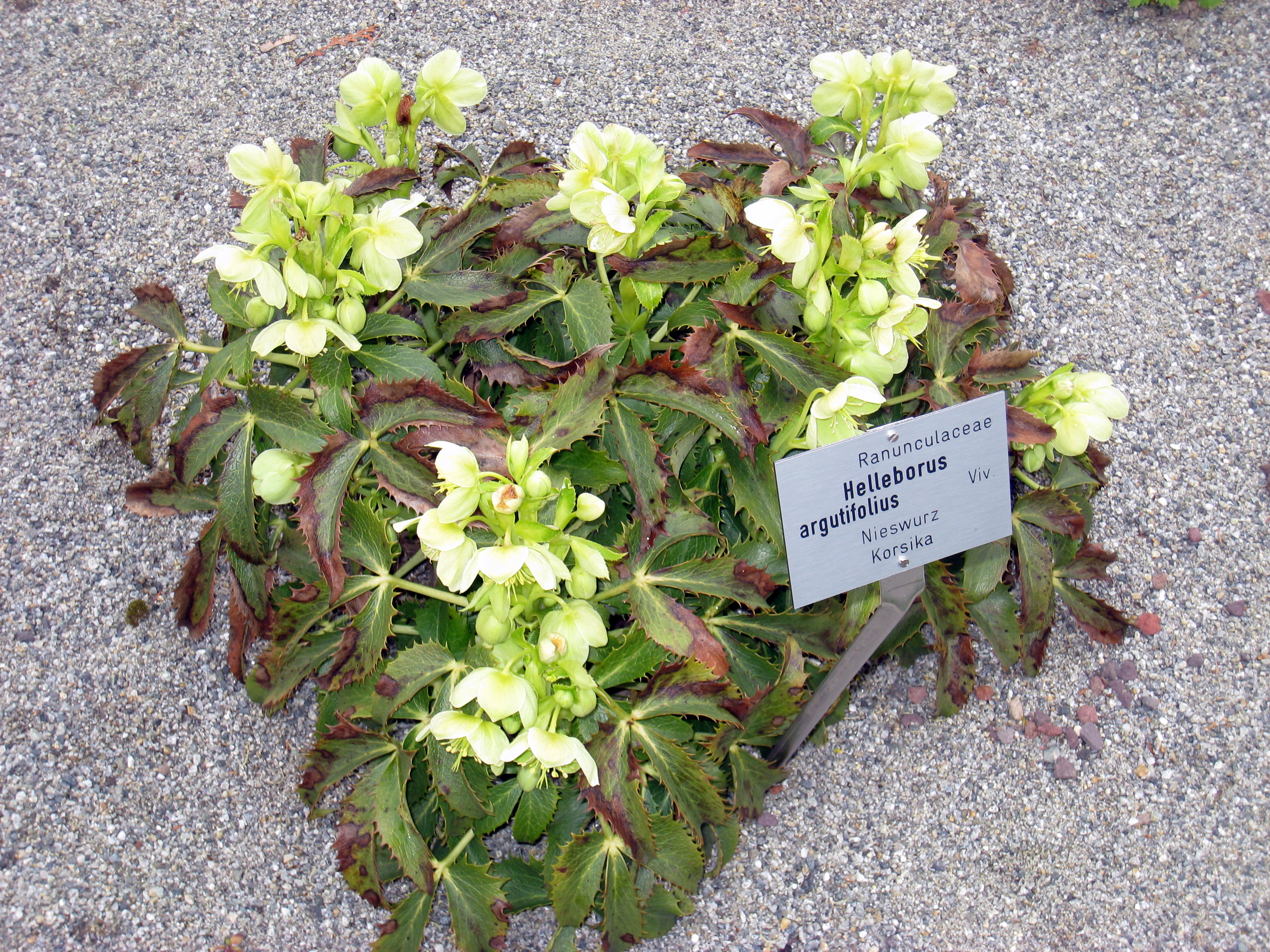 Helleborus argutifolius - Botanical Garden, Innsbruck, Austria.